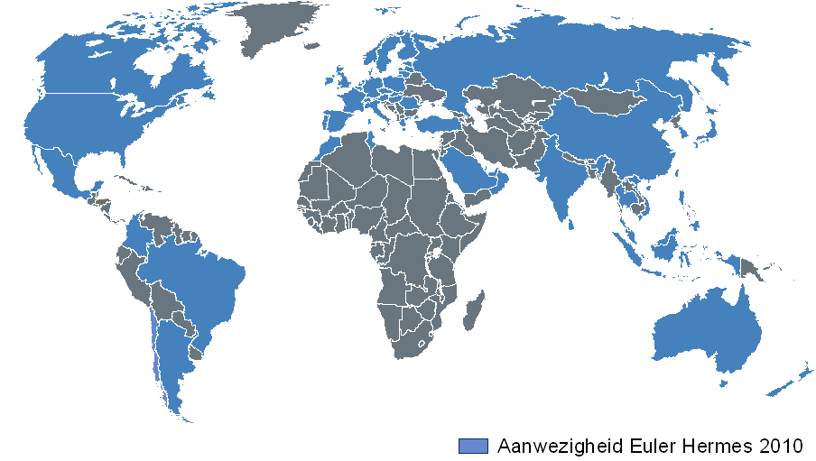 Een overzicht van de Landen waar Euler Hermes is vertegenwoordigd